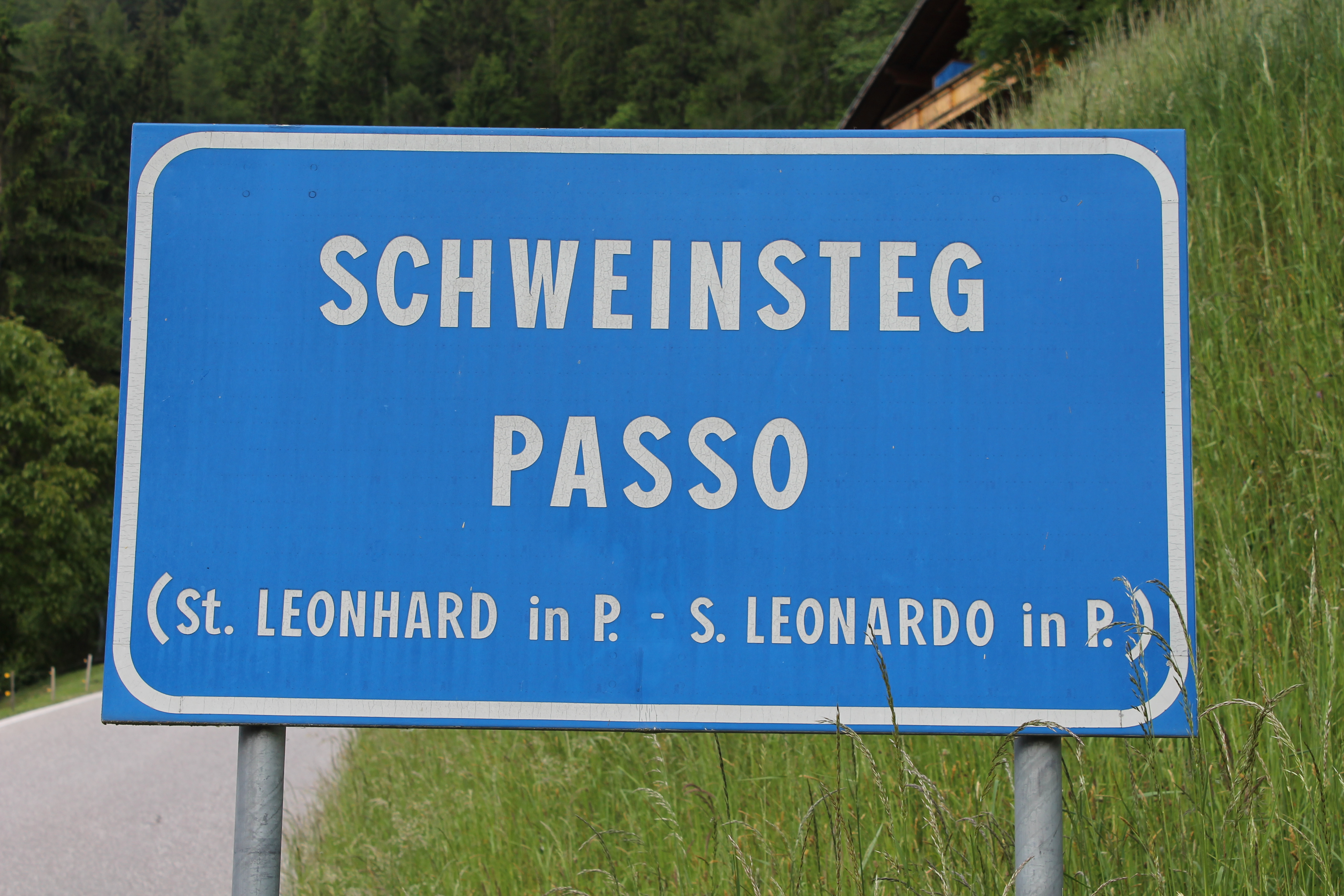 Das Ortsschild in Richtung Schweinsteg